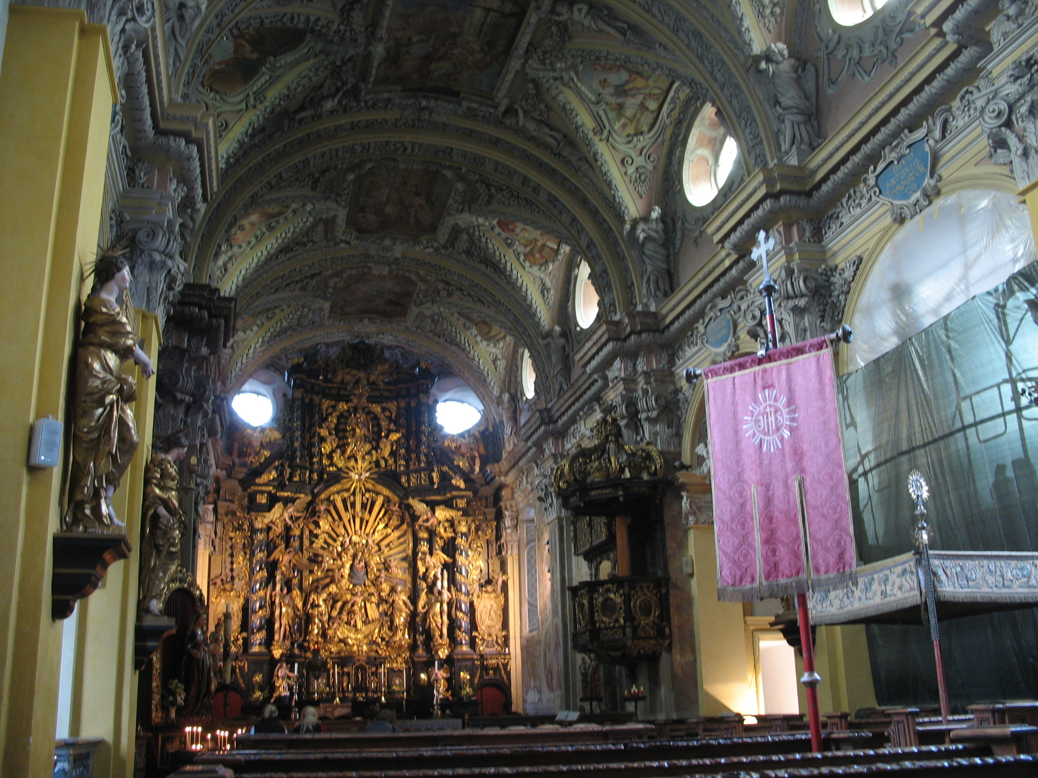 Wallfahrtskirche Frauenberg, Steiermark